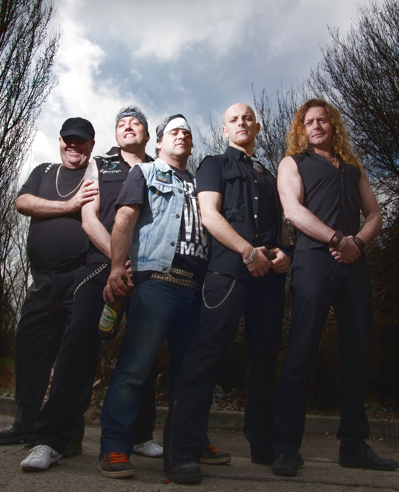 Formación 2011 del grupo de Rock VIGA